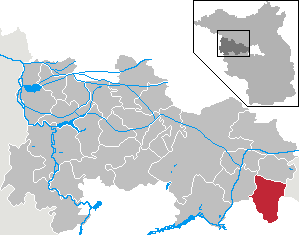 Dallgow-Döberitz in Brandenburg (Country) - District Havelland